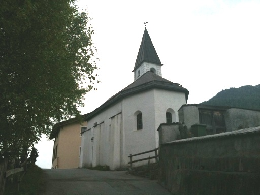 reformierte Kirche Brail (Oberengadin, Kanton Graubünden)